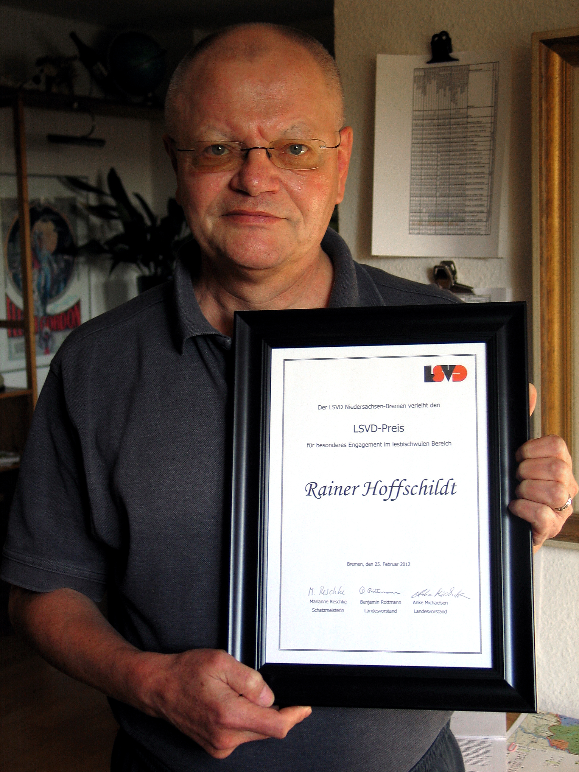 "Für besonderes Engagement im lesbischwulen Bereich" zeichnete der LSVD Niedersachsen-Bremen den Historiker und Archivar der Schwulenbewegung, Rainer Hoffschildt, aus, hier auf Wunsch des Fotografen durch die hochgehaltene und auf den 25. Februar 2012 datierten Urkunde dokumentiert ...